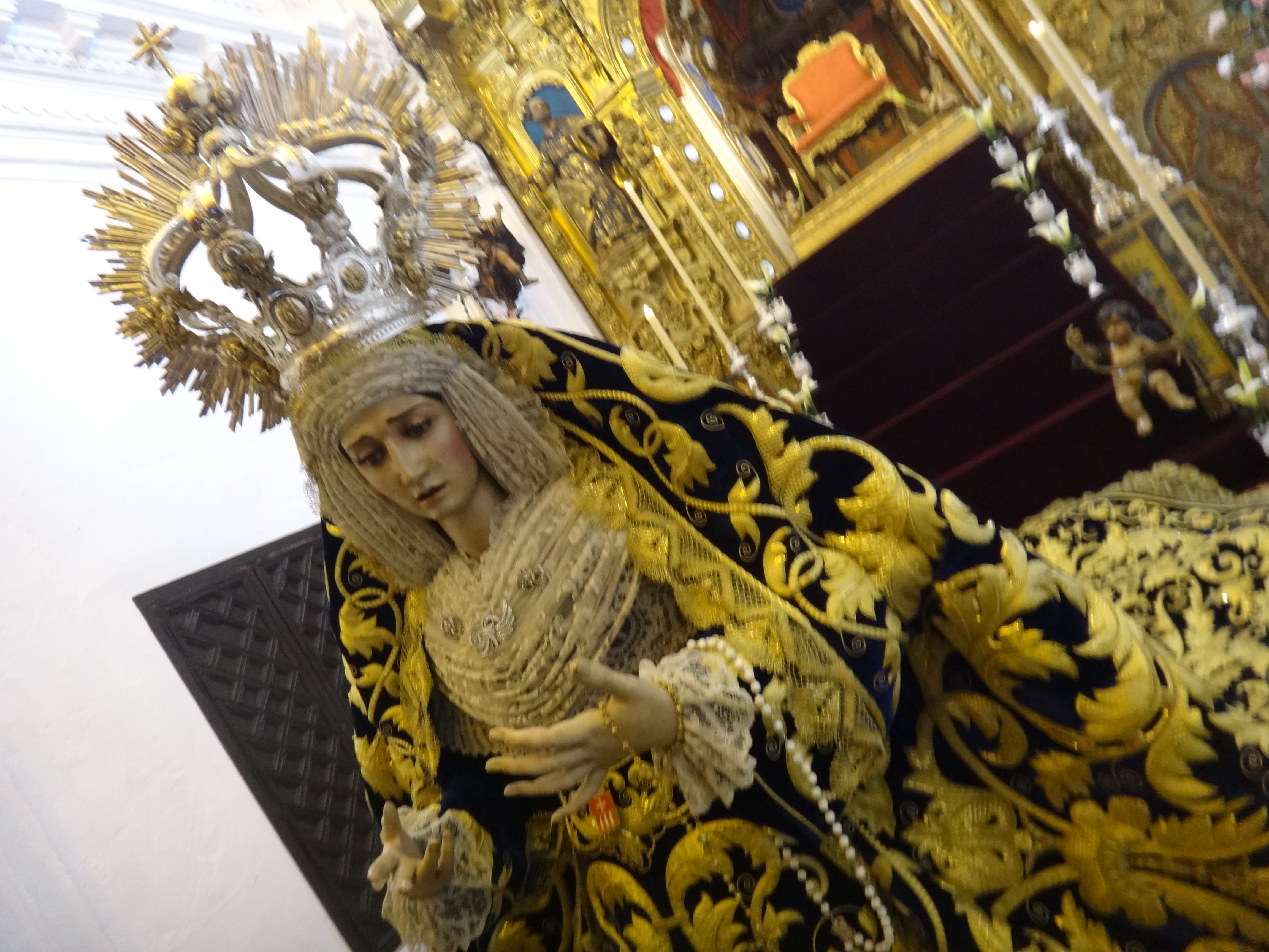 Iglesia de San Mateo en Jerez de la Frontera (Andalucía, España)